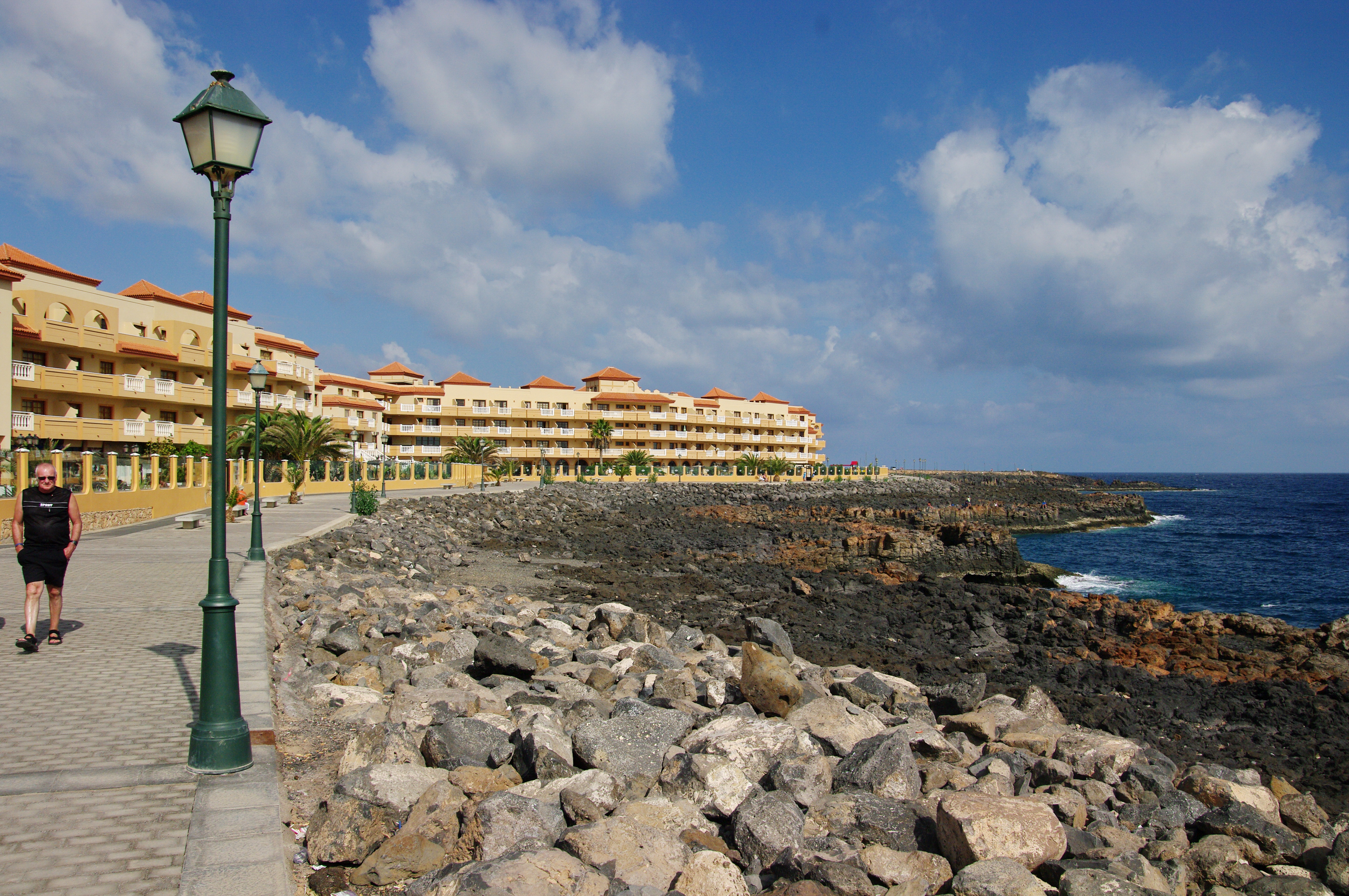 Uferpromenade Caleta de Fuste